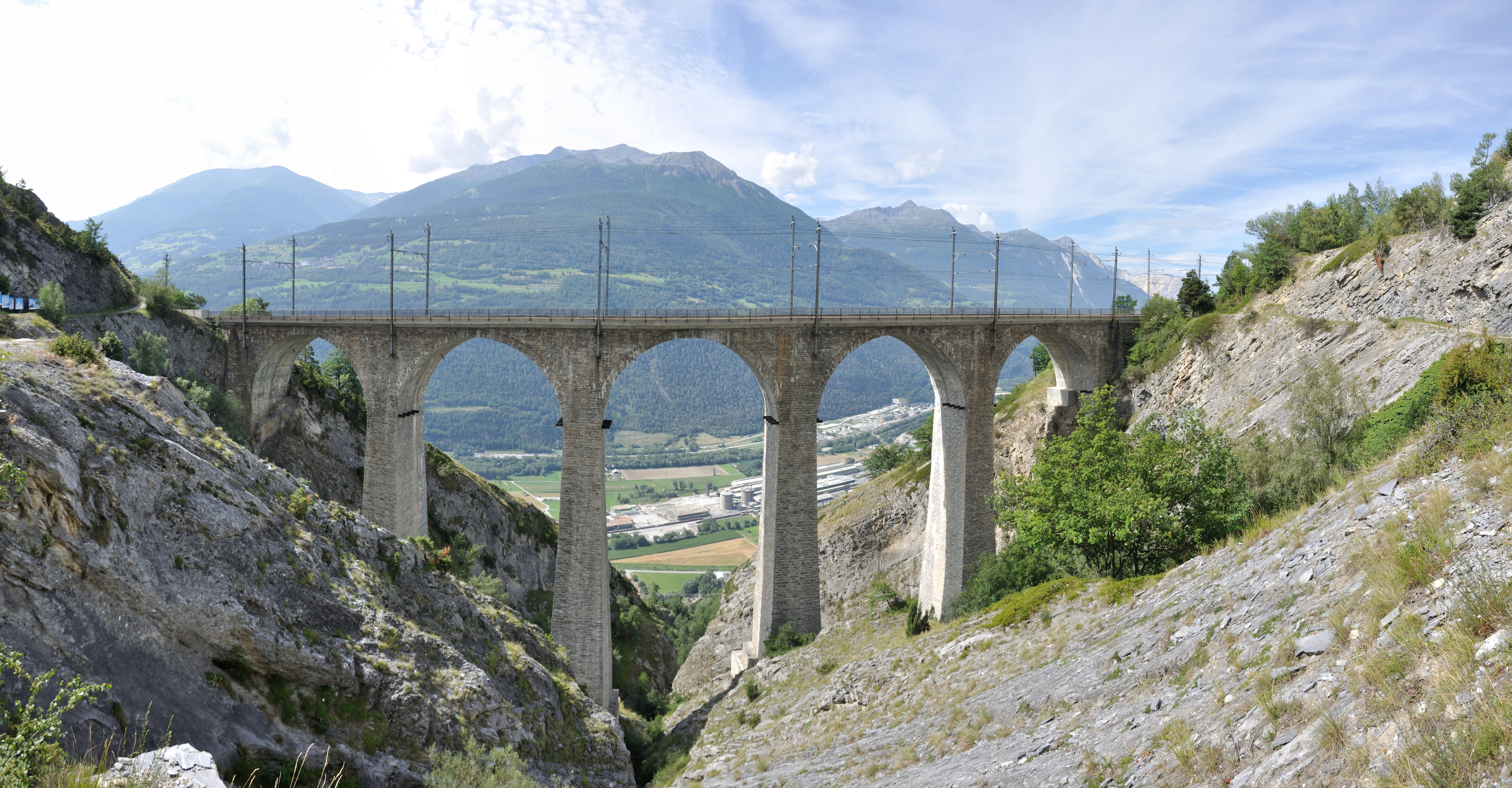 Switzerland, Valais, hike on Lötschberg Südrampe